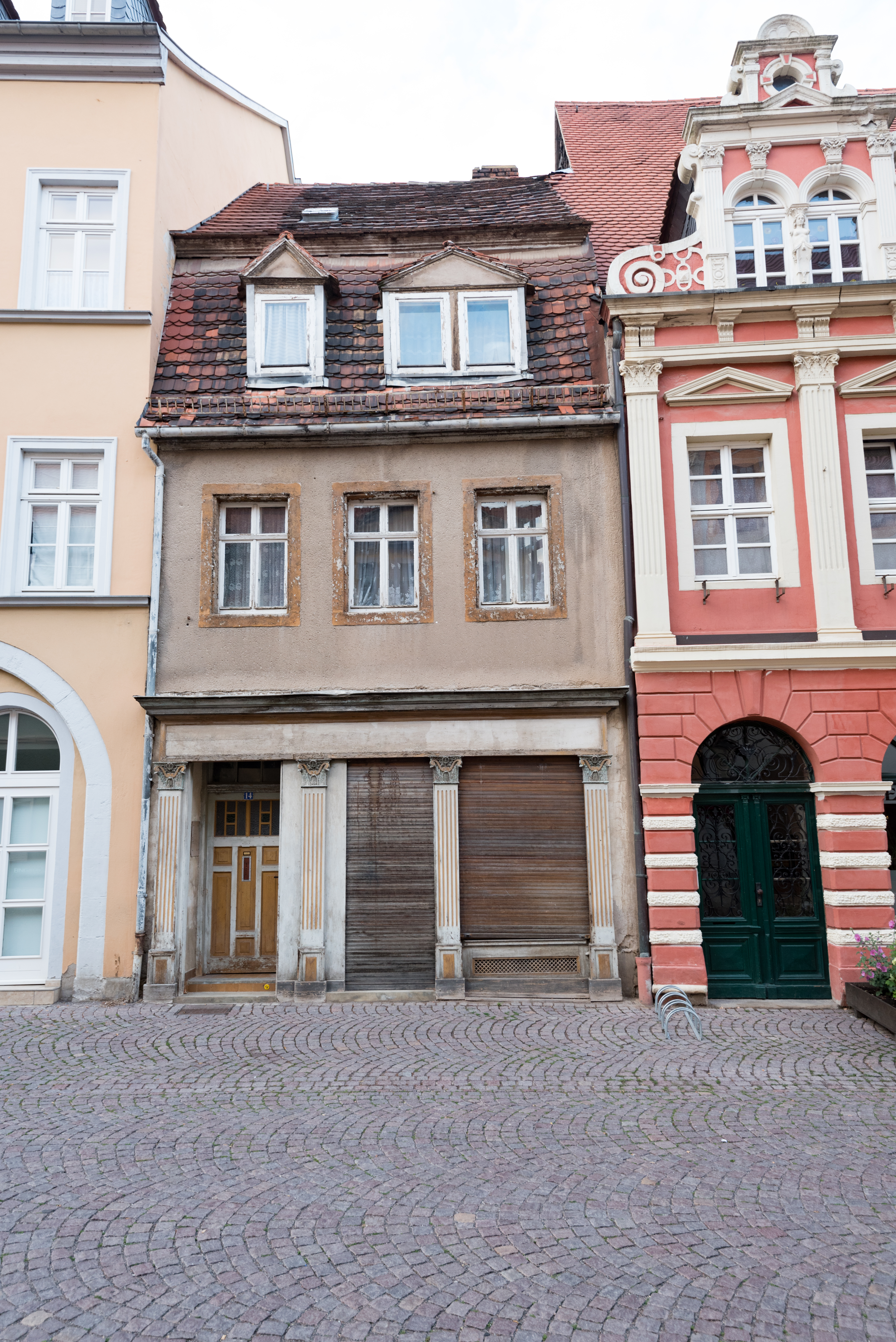 Naumburg (Saale), Salzstraße 14